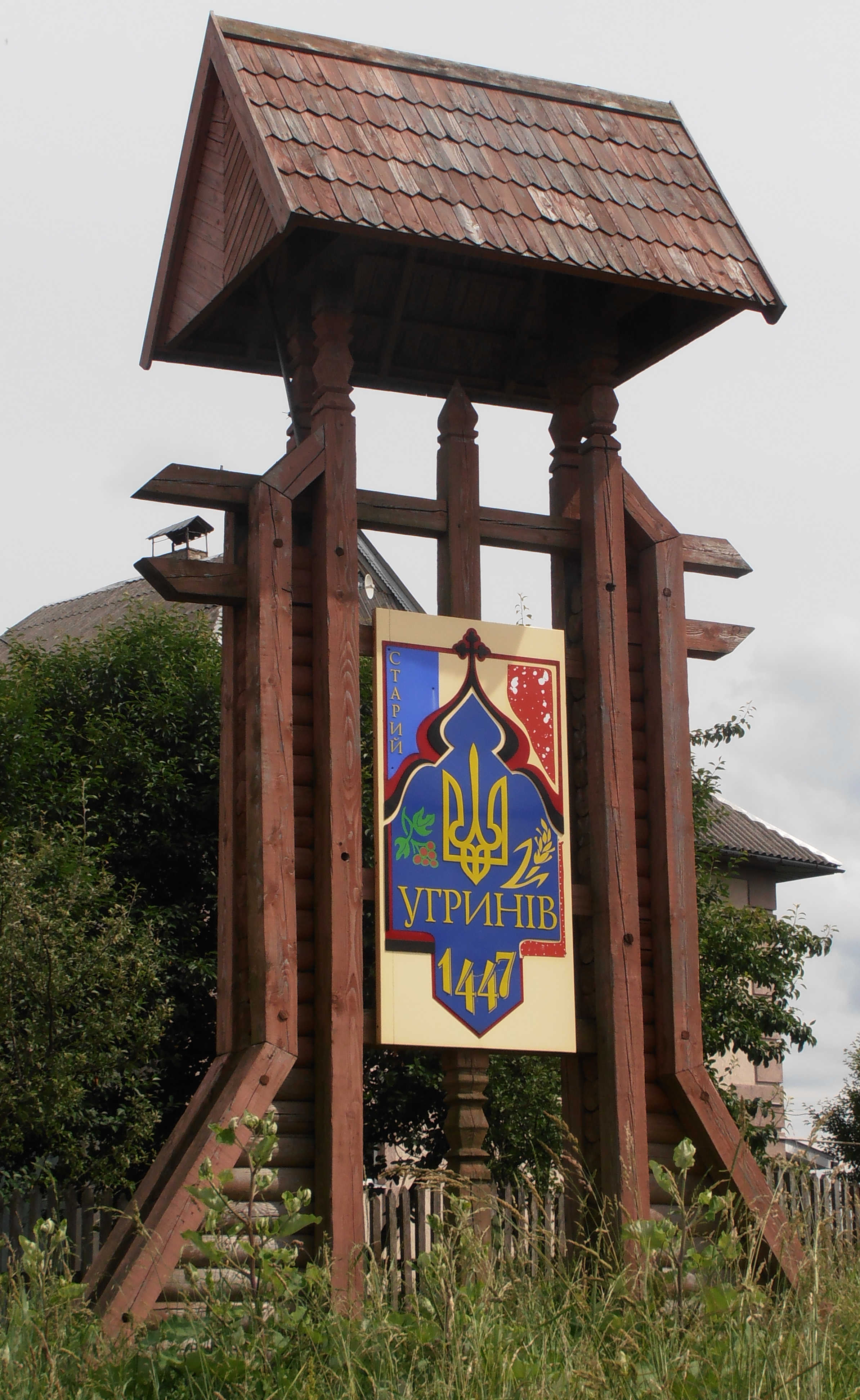 Знак з помилковою датою заснування